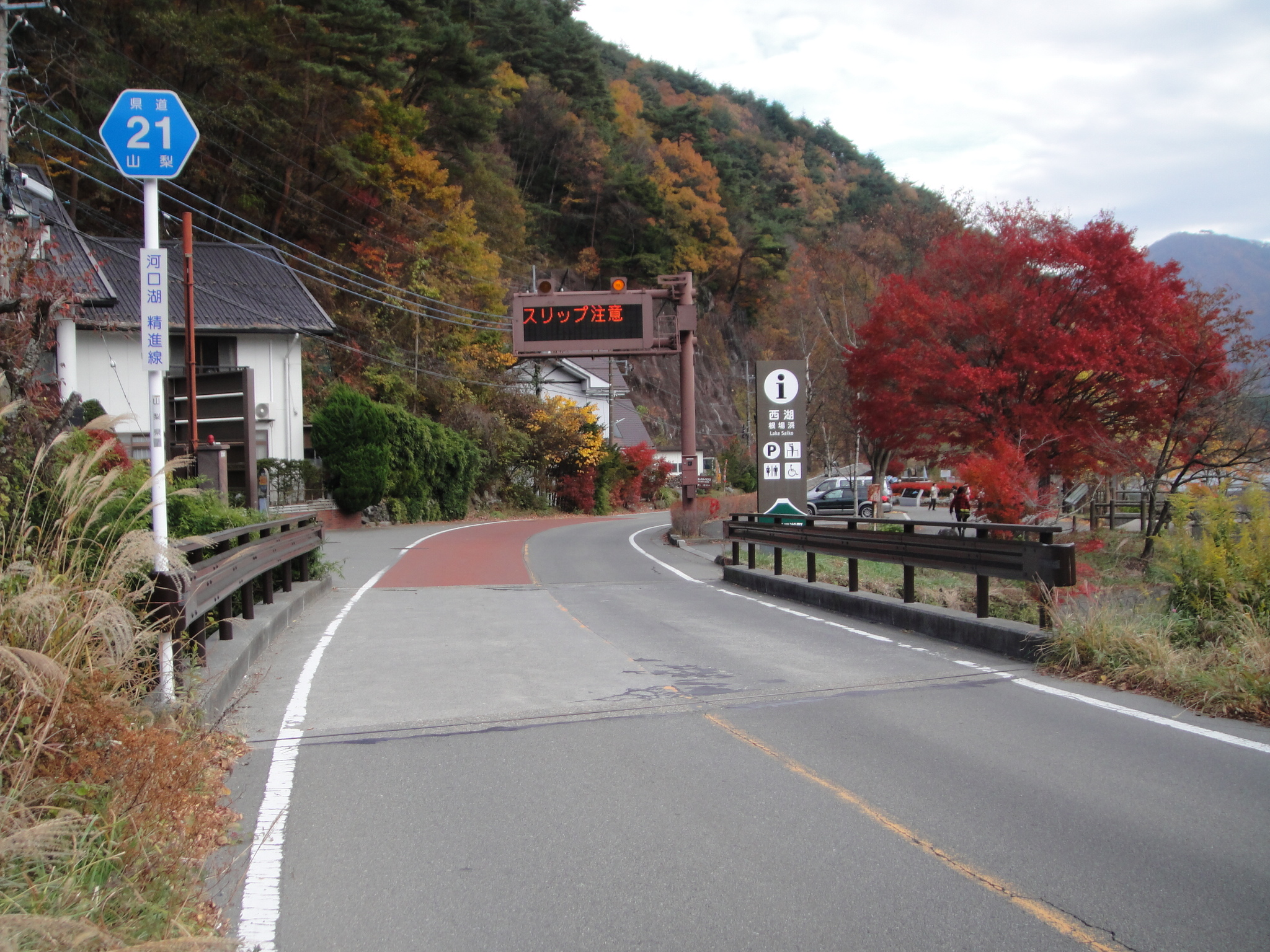 山梨県道21号を西湖西岸付近で撮影